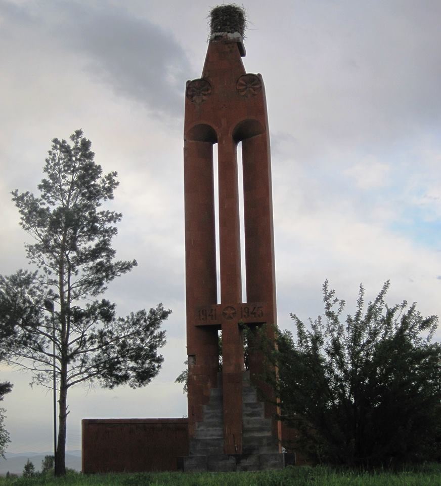 Հայրենական մեծպատերազմի զոհերին նվիրված կոթող։ 32/4